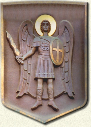 Герб Києва, затверджений 18 квітня 1995 року